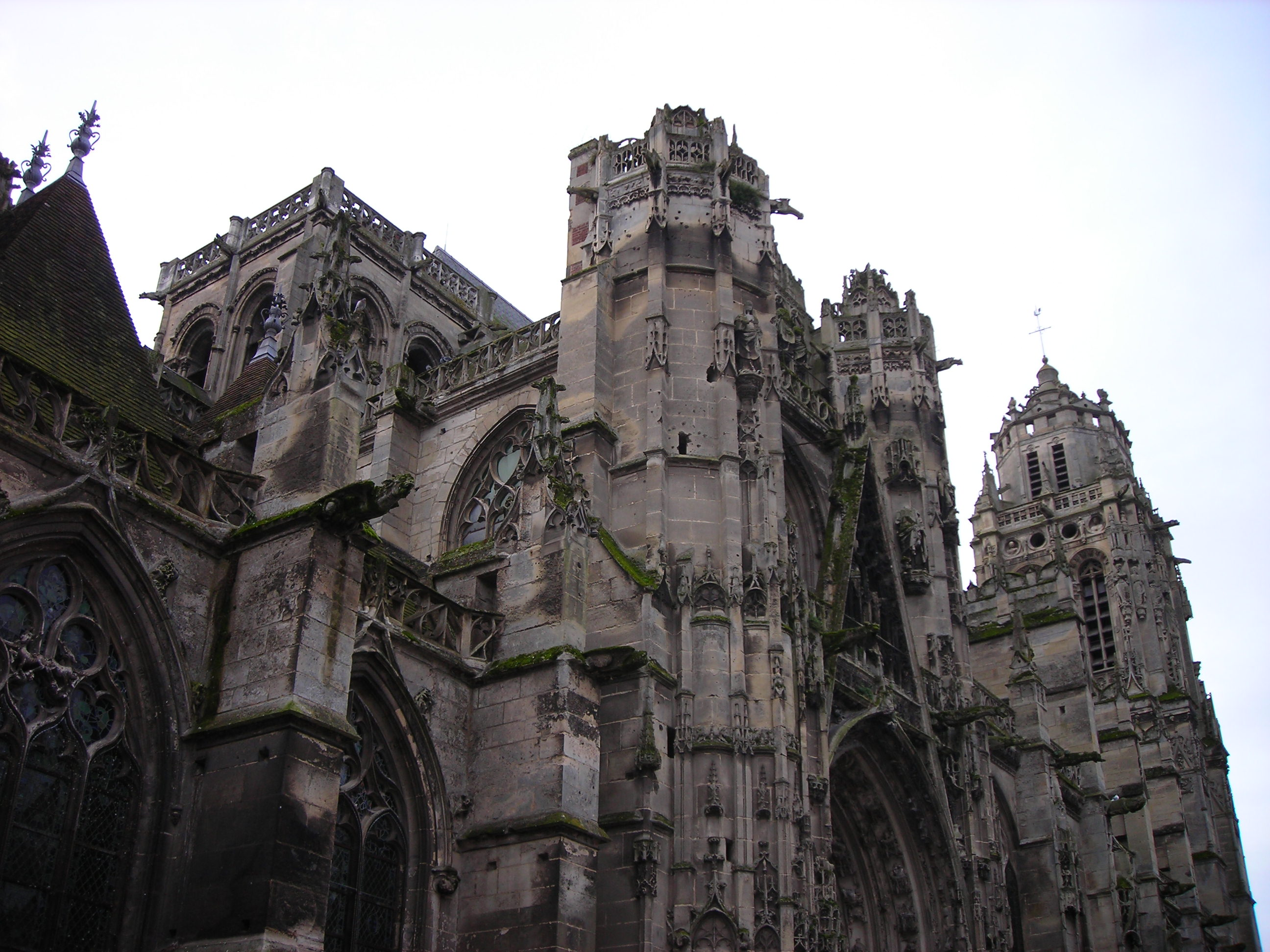 Église de Gisors, France